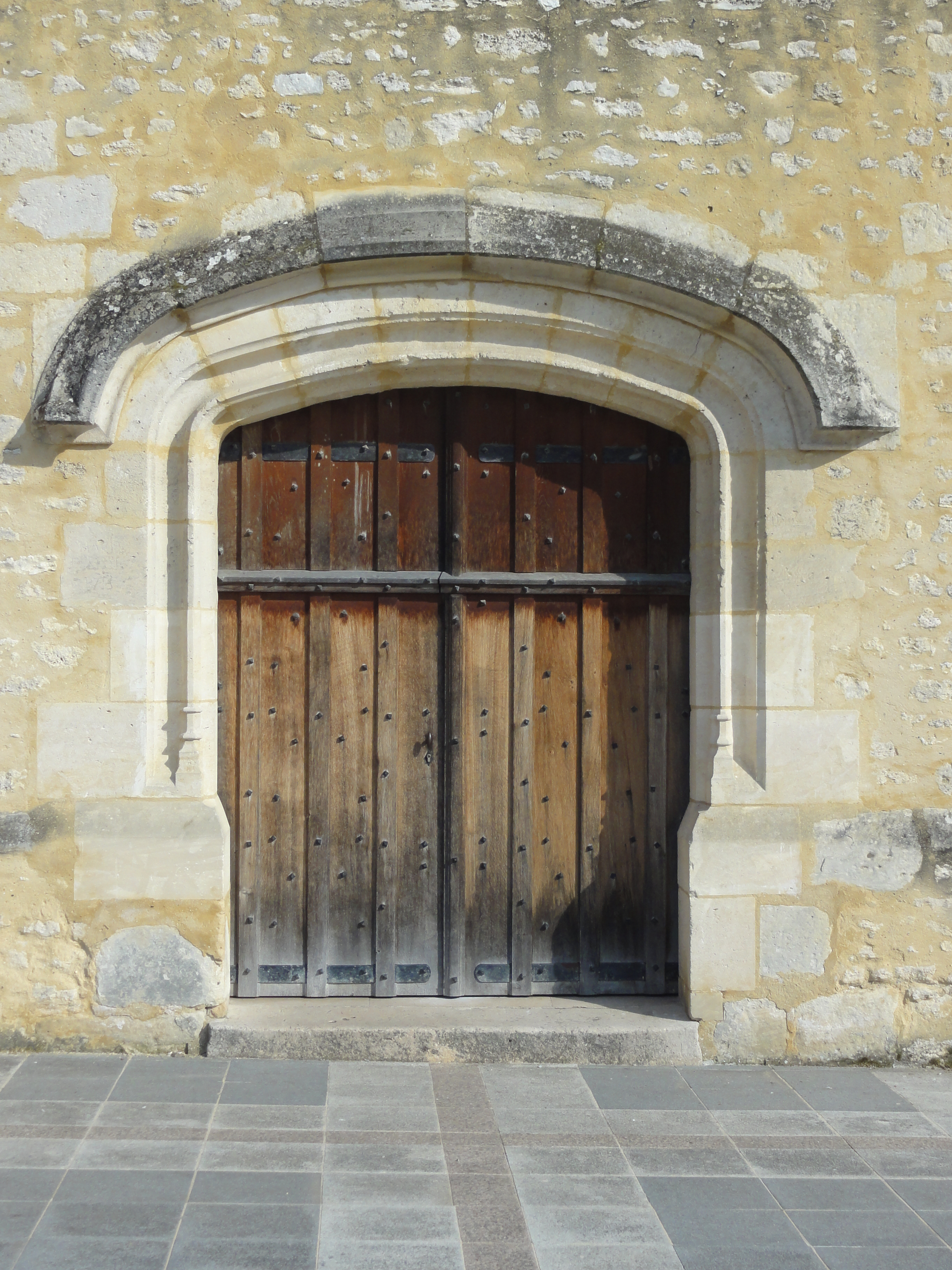 Église Saint-Denis de Bornel - voir titre.